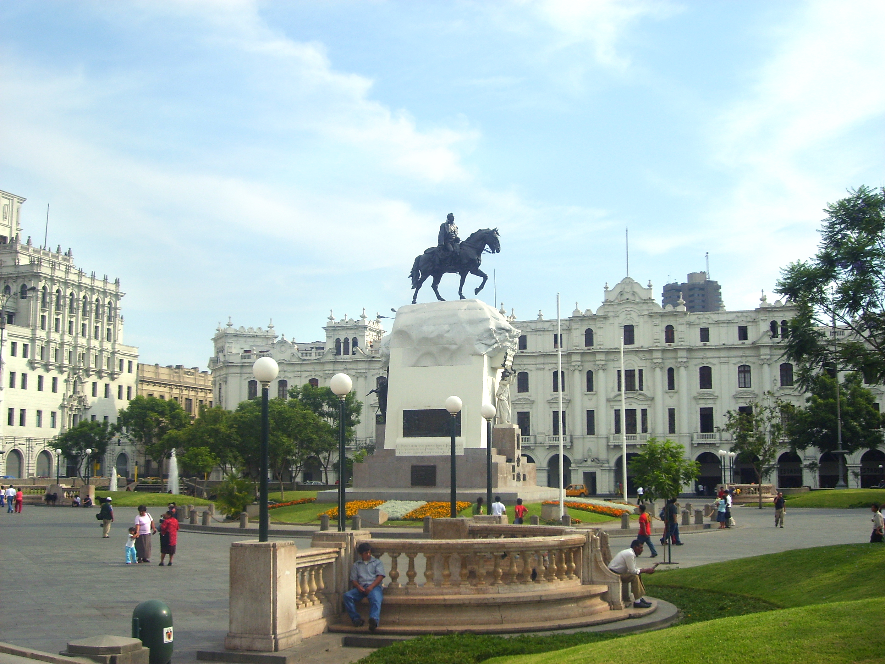 Plaza San Martín en el centro histórico de Lima, Perú. En su centro se aprecia el monumento en honor al Libertador y Protector del Perú Don José de San Martín.